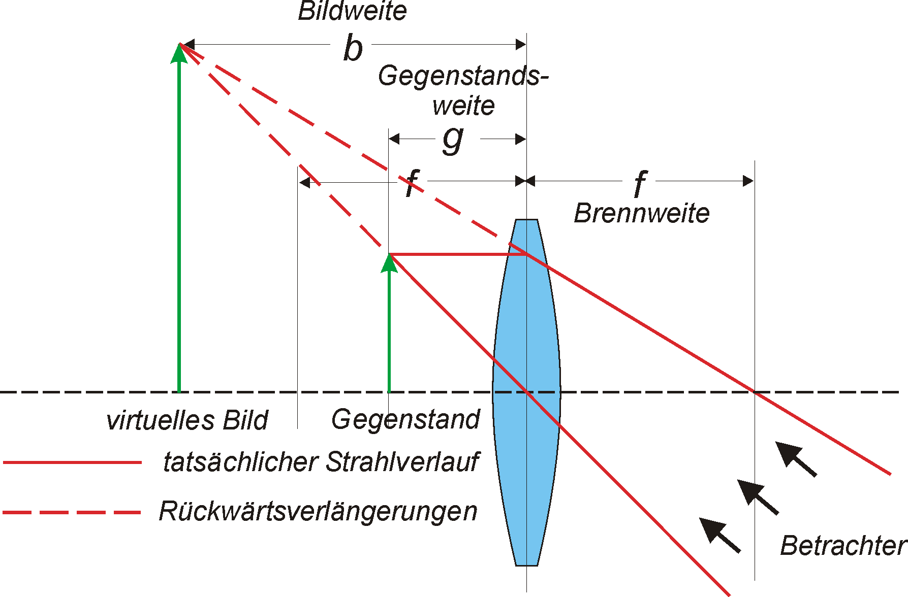 Strahlengang bei einem virtuellen Bild „“(Lupenbild) bei einer Sammellinse